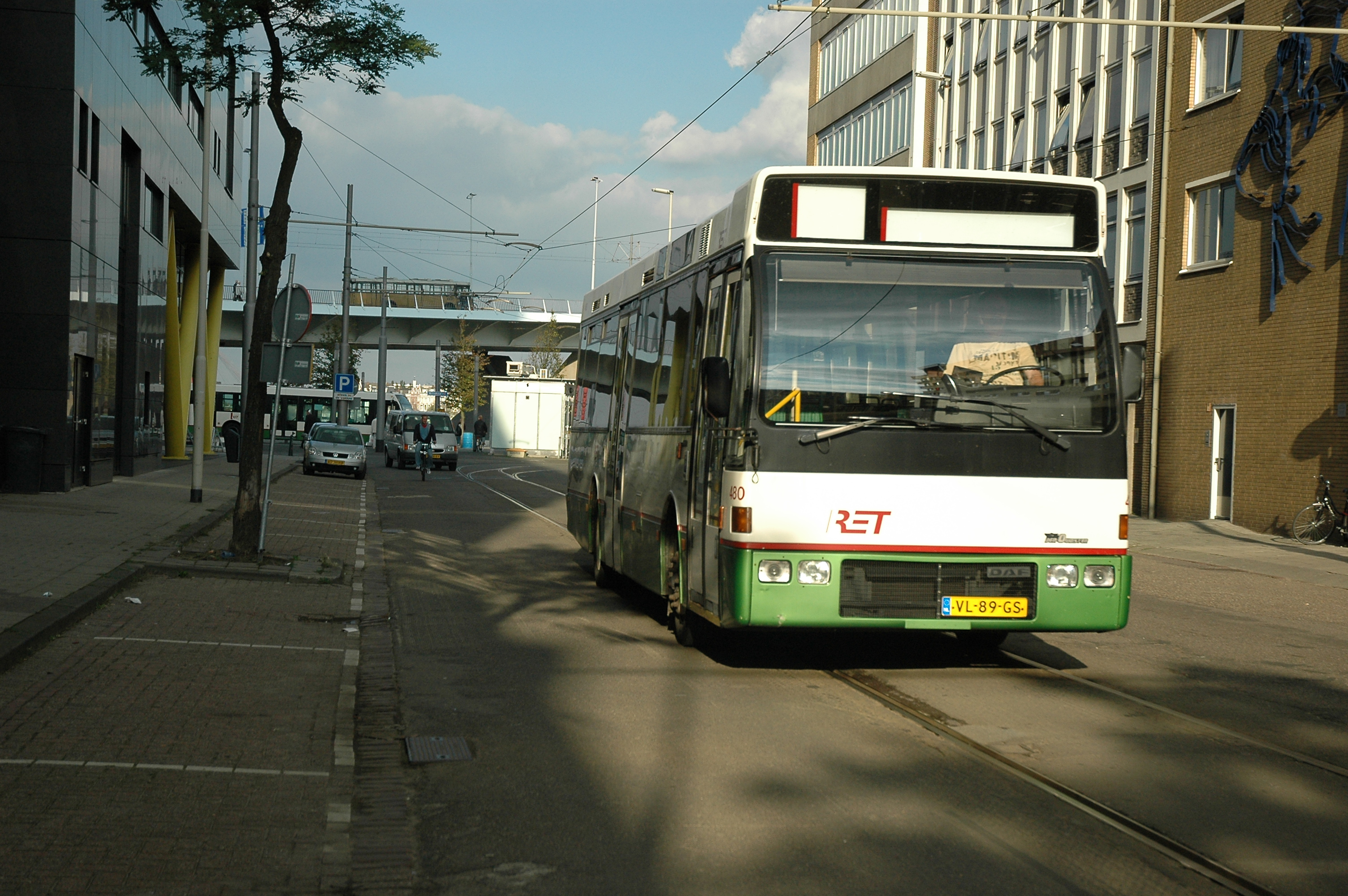 Rotterdamse Elektrische Tram (RET) bus 480 van het type Den Oudsten/DAF SB220L0550 Duvedec-bus te Rotterdam.